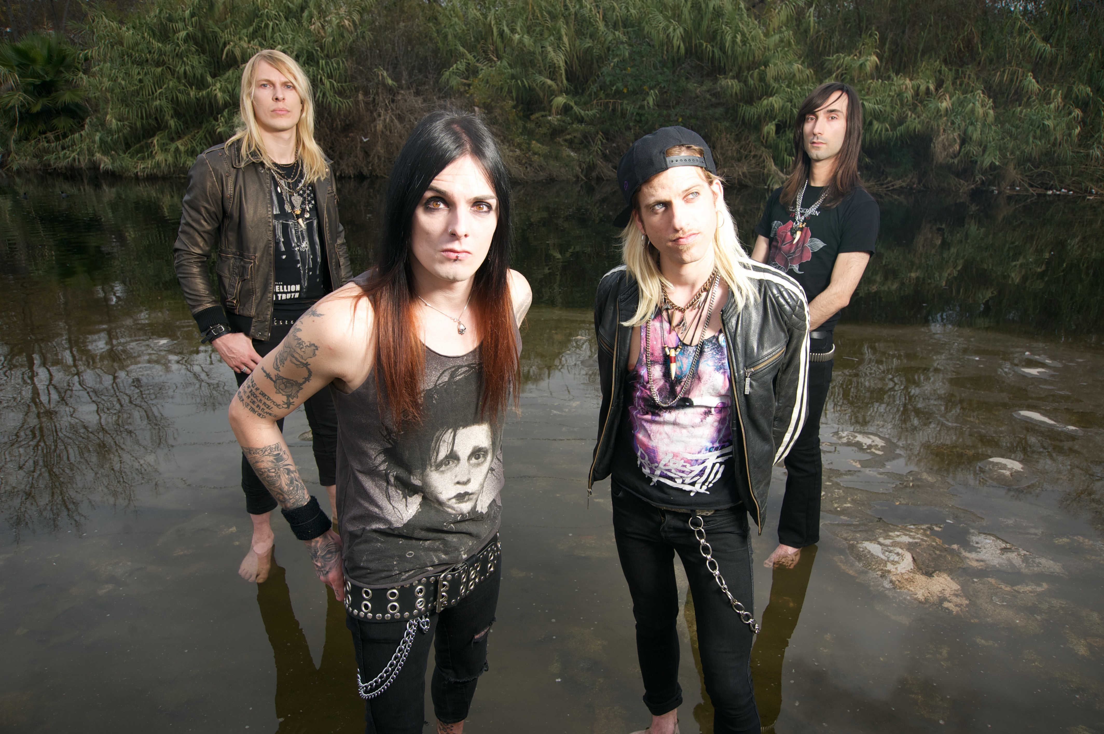 BlackRain lors de sa séance photo avec Dean Karr à Los Angeles en 2015